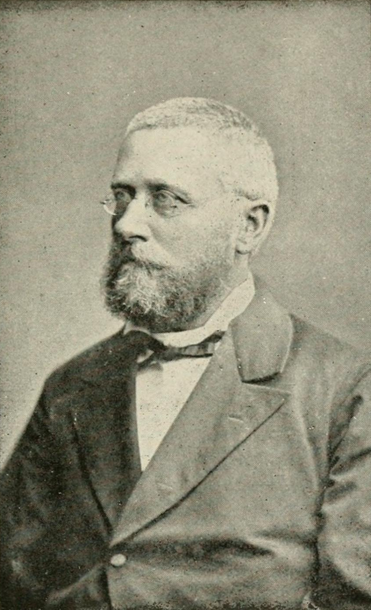 Hornjoserbsce: Jan Ćěsla, tež Jan Handrik-Ćěsla (1840–1915); lěkar, MUDr., a serbski basnik a přełožowar.